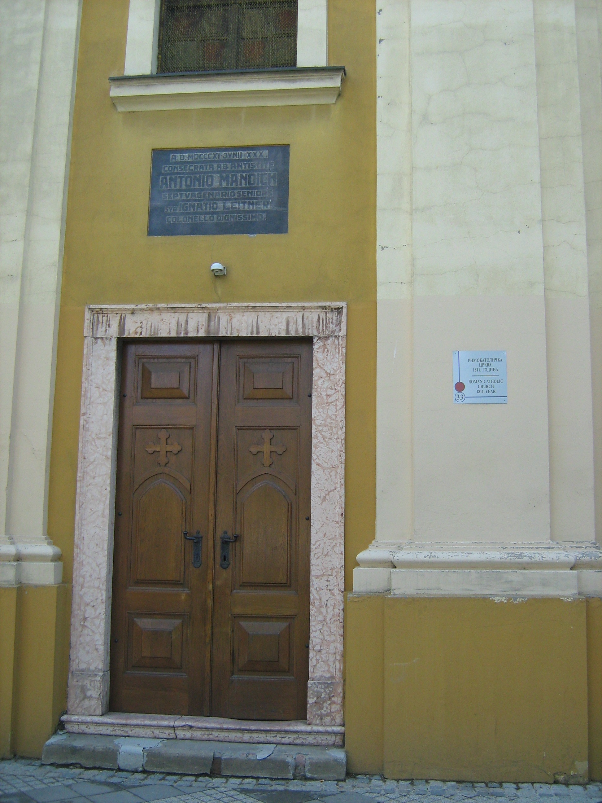 Римокатоличка црква Светог Димитрија, Сремска Митровица